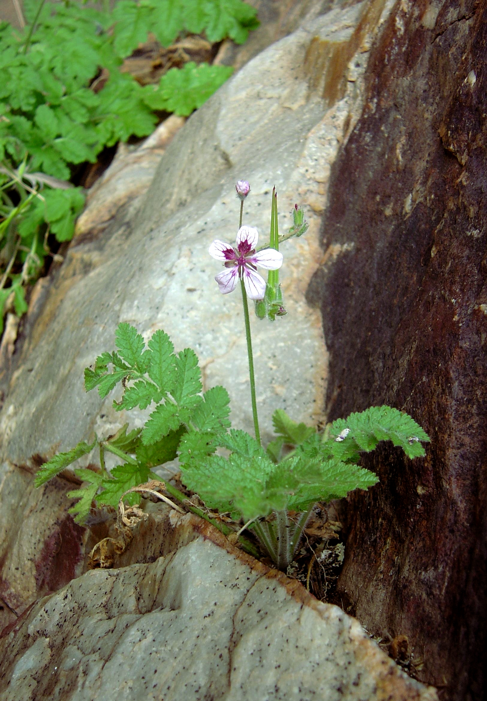 Erodium mouretii - Quintana de la Serena (Badajoz, Extremadura)